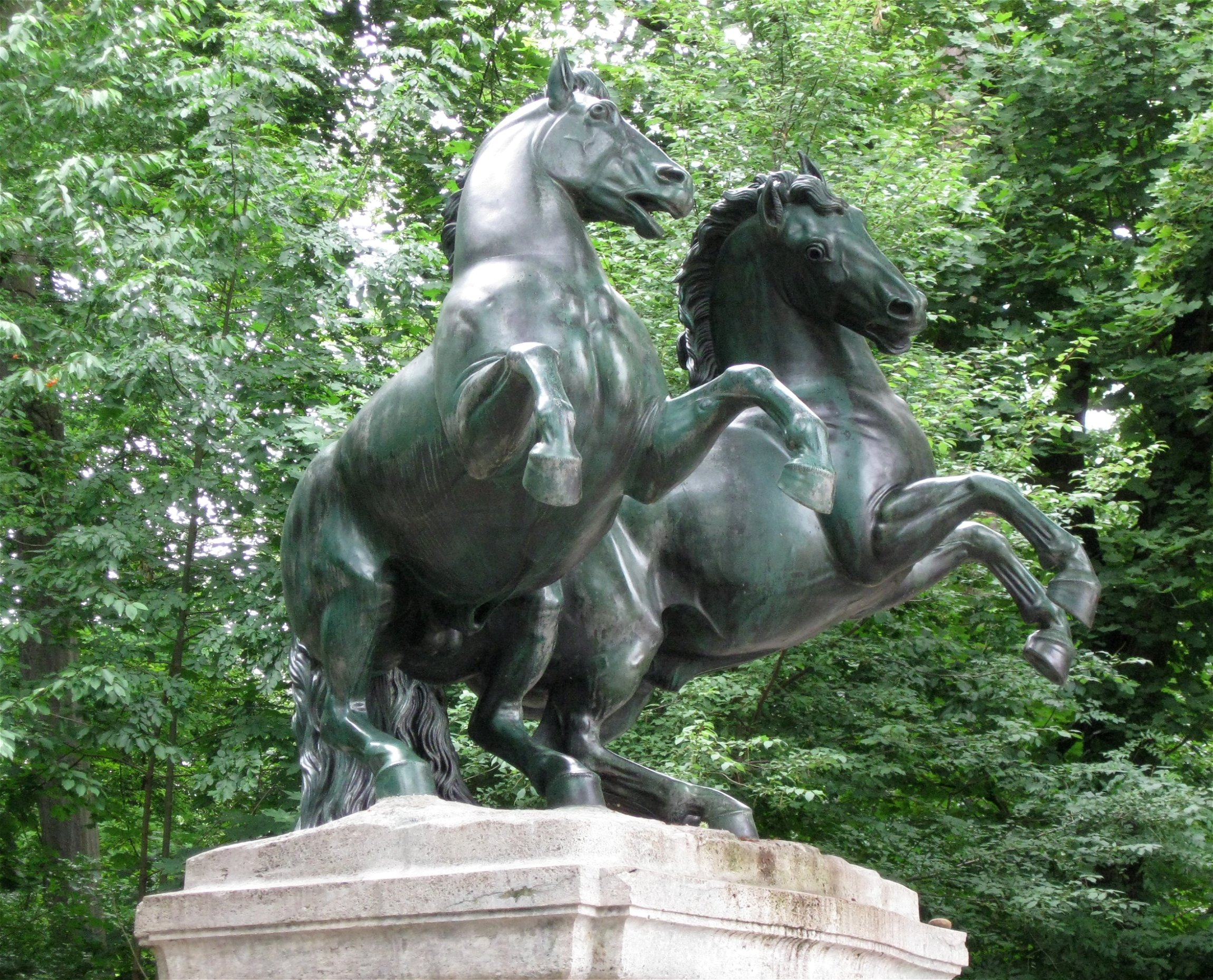 Bronzegruppe "Wilde Pferde" von Georg Roemer, Bavariapark München